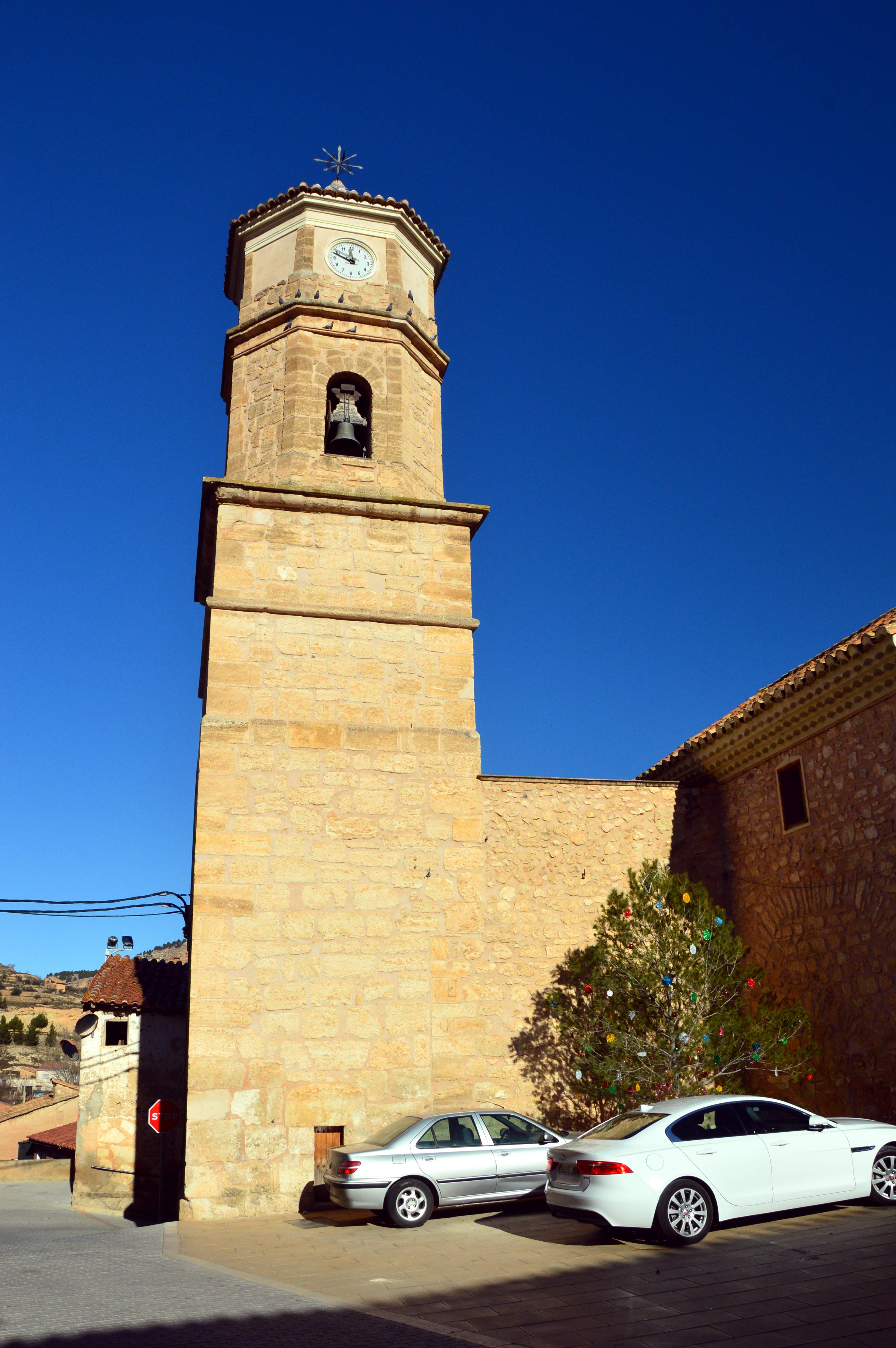 Vista general (meridional) del campanario de la parroquial de Casas Altas (Valencia), 2018.